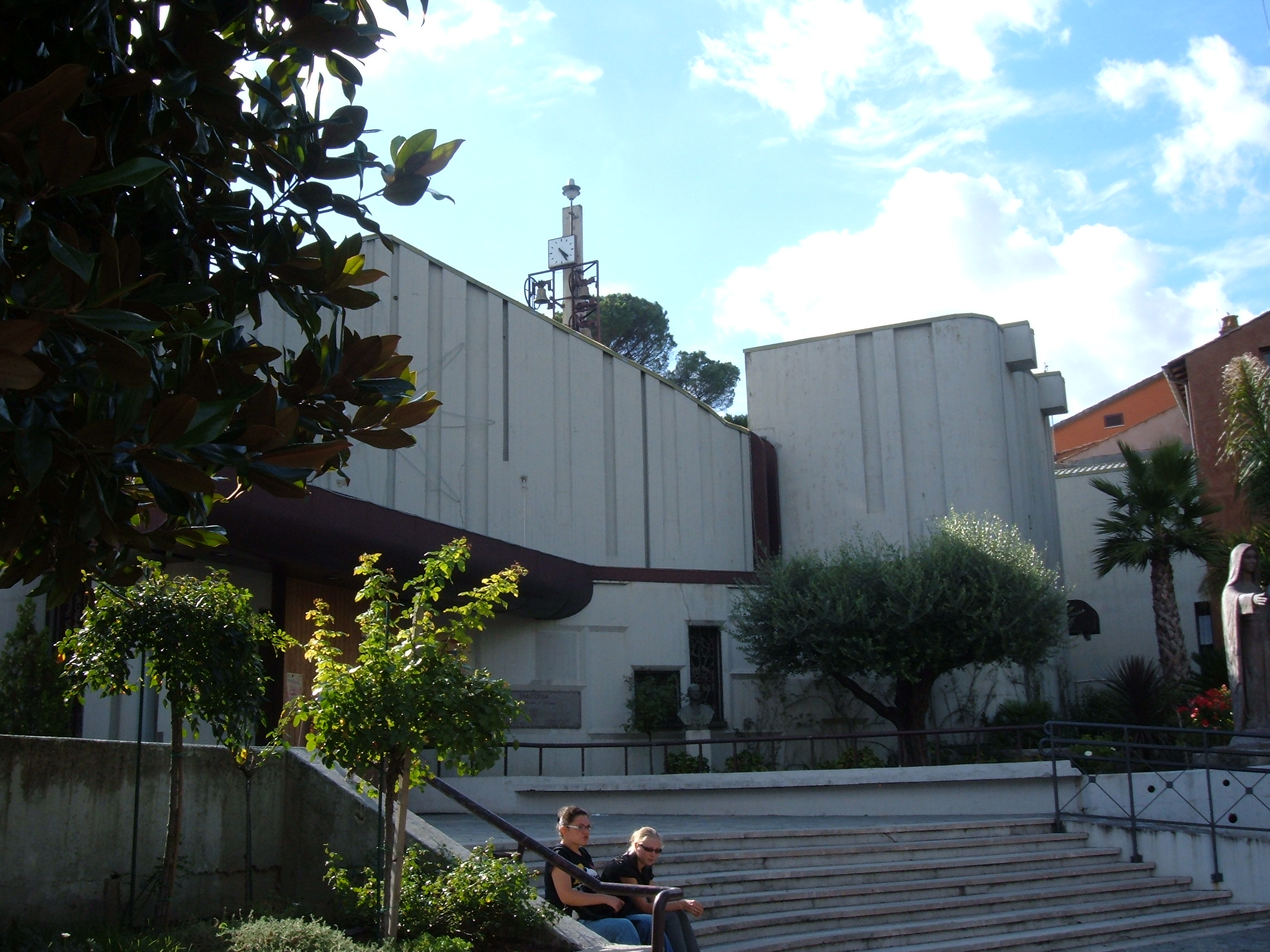 Nuova chiesa dei Santi Urbano e Lorenzo a Prima Porta, costruita nella seconda metà del XX secolo.